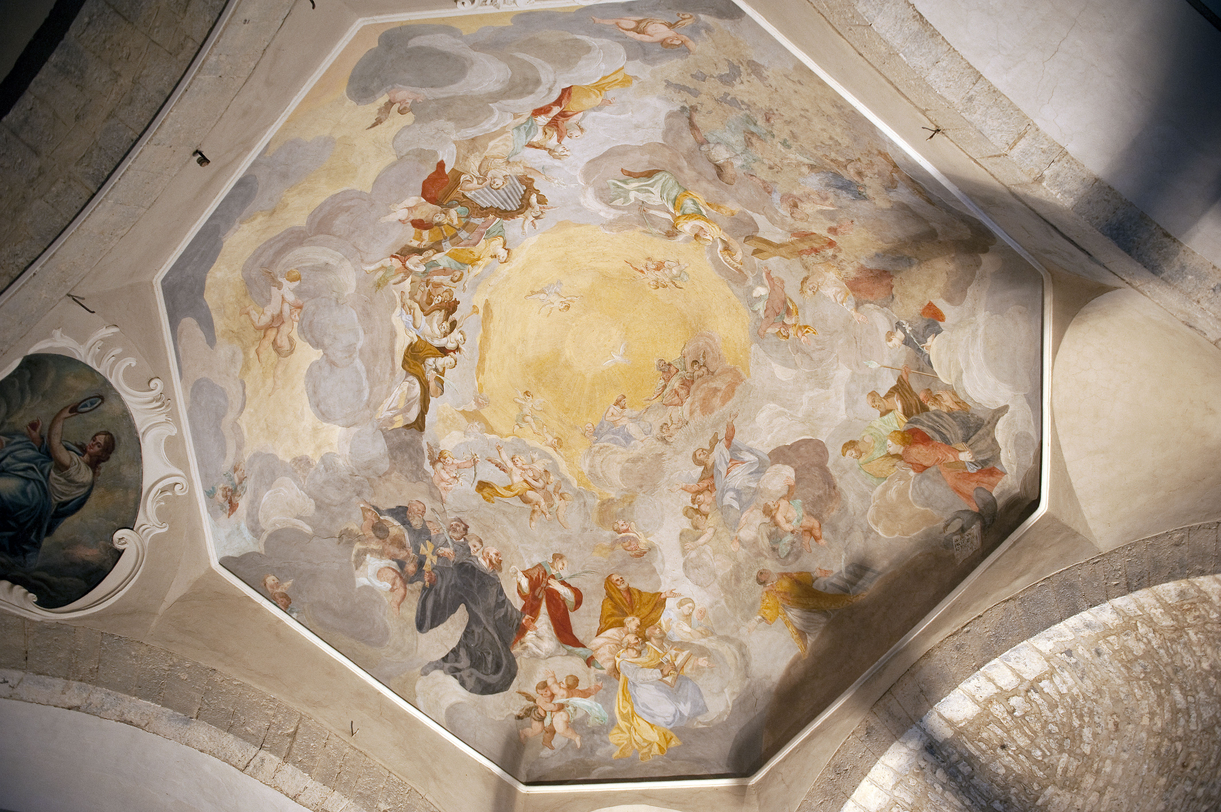 Affreschi nella cupola di Badia a Coltibuono